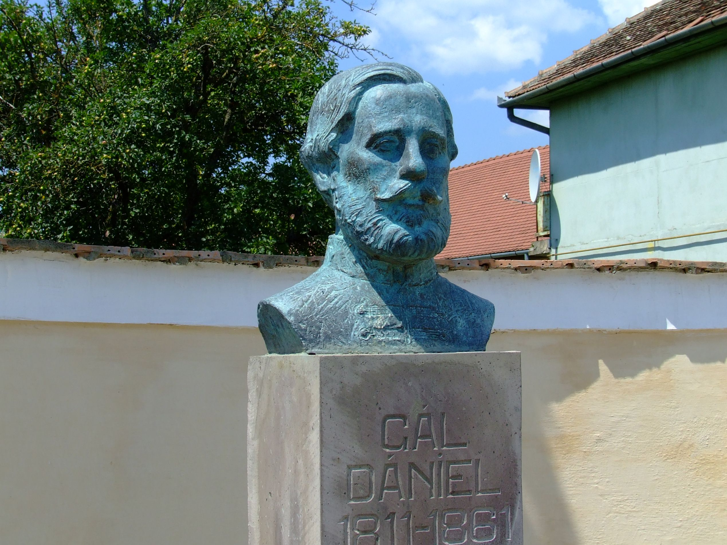 ilyefalvi Gál Dániel (1811–1861) ügyvéd, országgyűlési képviselő, kormánybiztos szobra Illyefalván. Vargha Mihály kézdivásárhelyi születésű (1961) szobrászművész alkotása (2008)